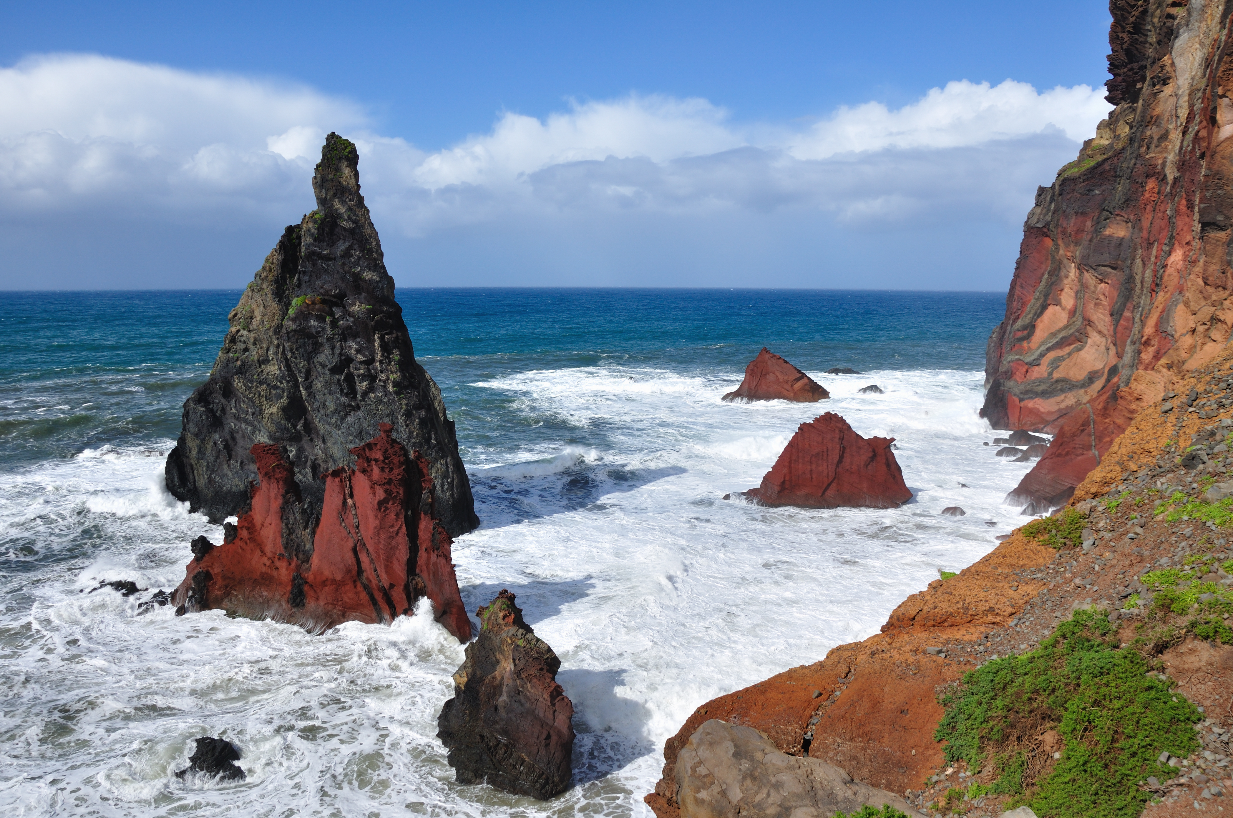 Portugal, Ponta de São Lourenço